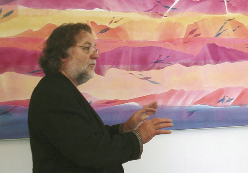 Der Maler Reinhard Fritz bei einem Vortrag in der Galerie Forum Lindenthal, Köln, vor seinem Bild "Berge und schöne Mühen"